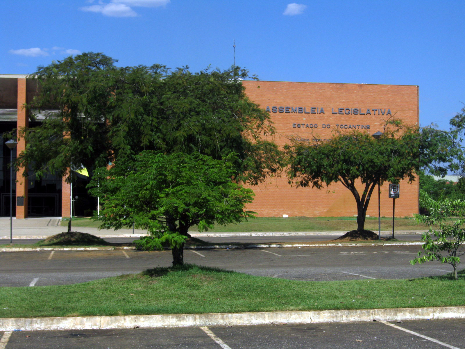 Assembleia Legislativa do Estado do Tocantins em Palmas, capital do estado, no Brasil